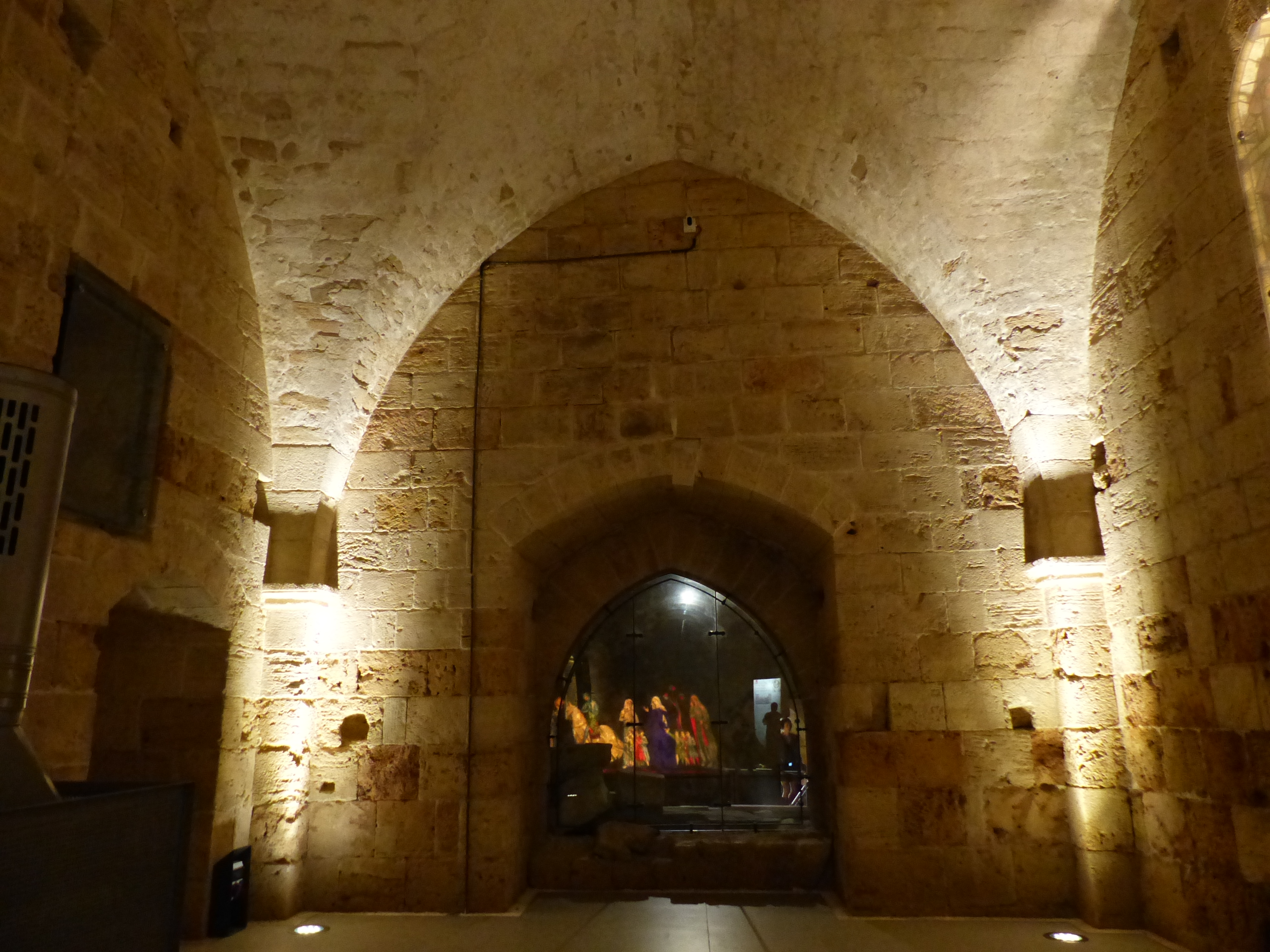 Castillo de Acre, Israel